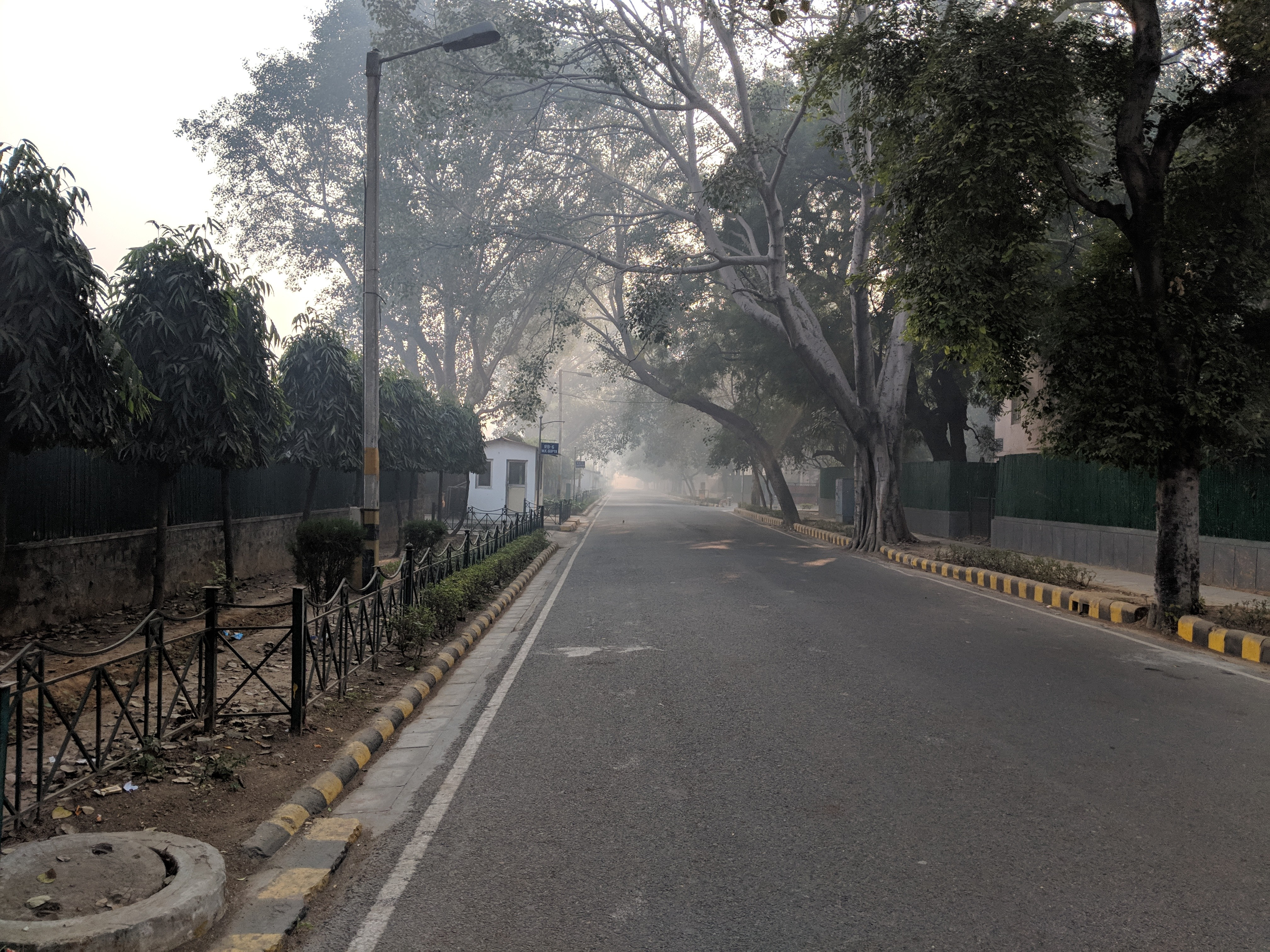 Аҧсшәа: Moti Bagh